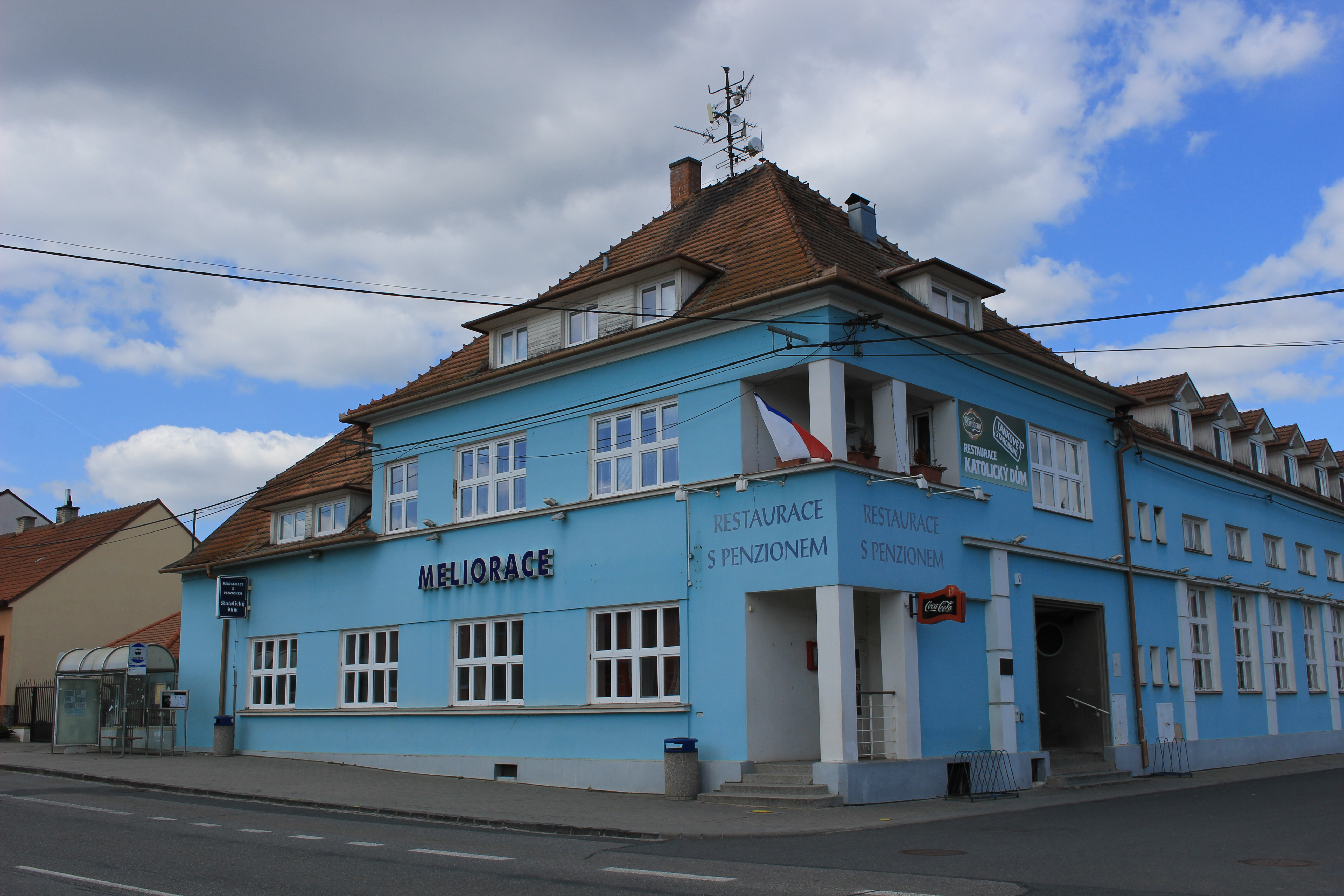 Katolický dům, Žarošice, okres Hodonín, Jihomoravský kraj